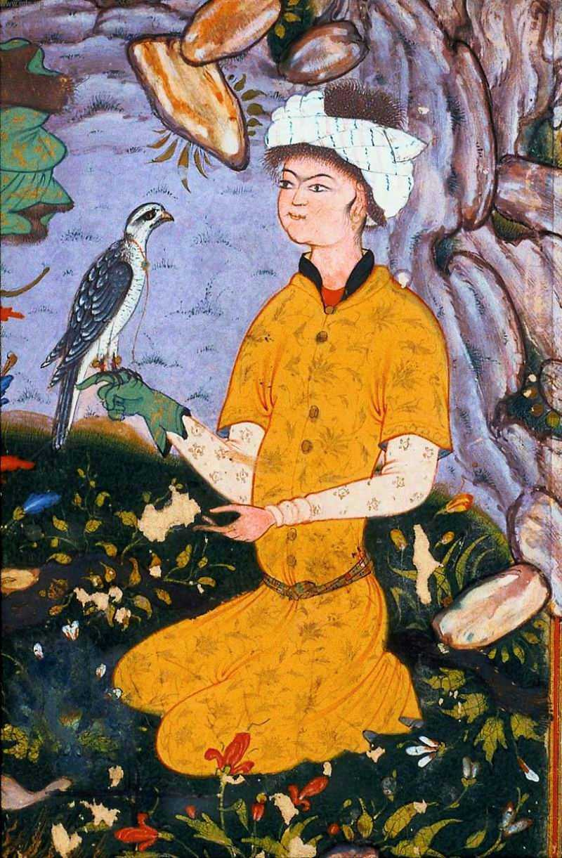 Mirza_Ali_Охотничий_привал,_деталь,_Сокольничий._1575